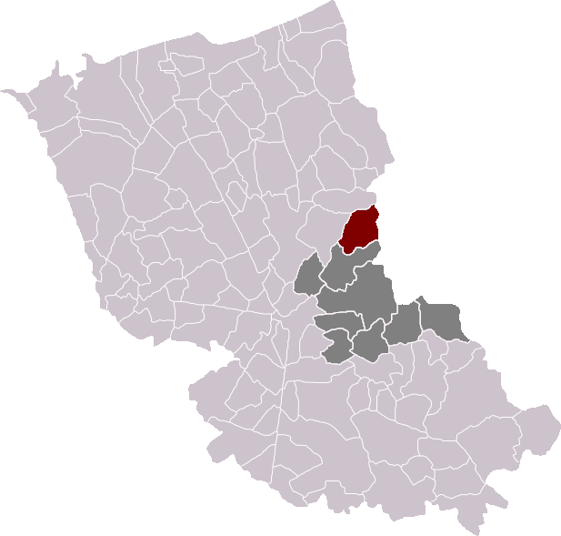 Locatie gemeente Houtkerke in arrondissement Duinkerke. Zelfgemaakt. Location of Houtkerque municipality in the arrondissement of Dunkirk. Self made. Localisation de la commune d'Houtkerque dans l'arrondissement de Dunkerque. Fait moi-même.